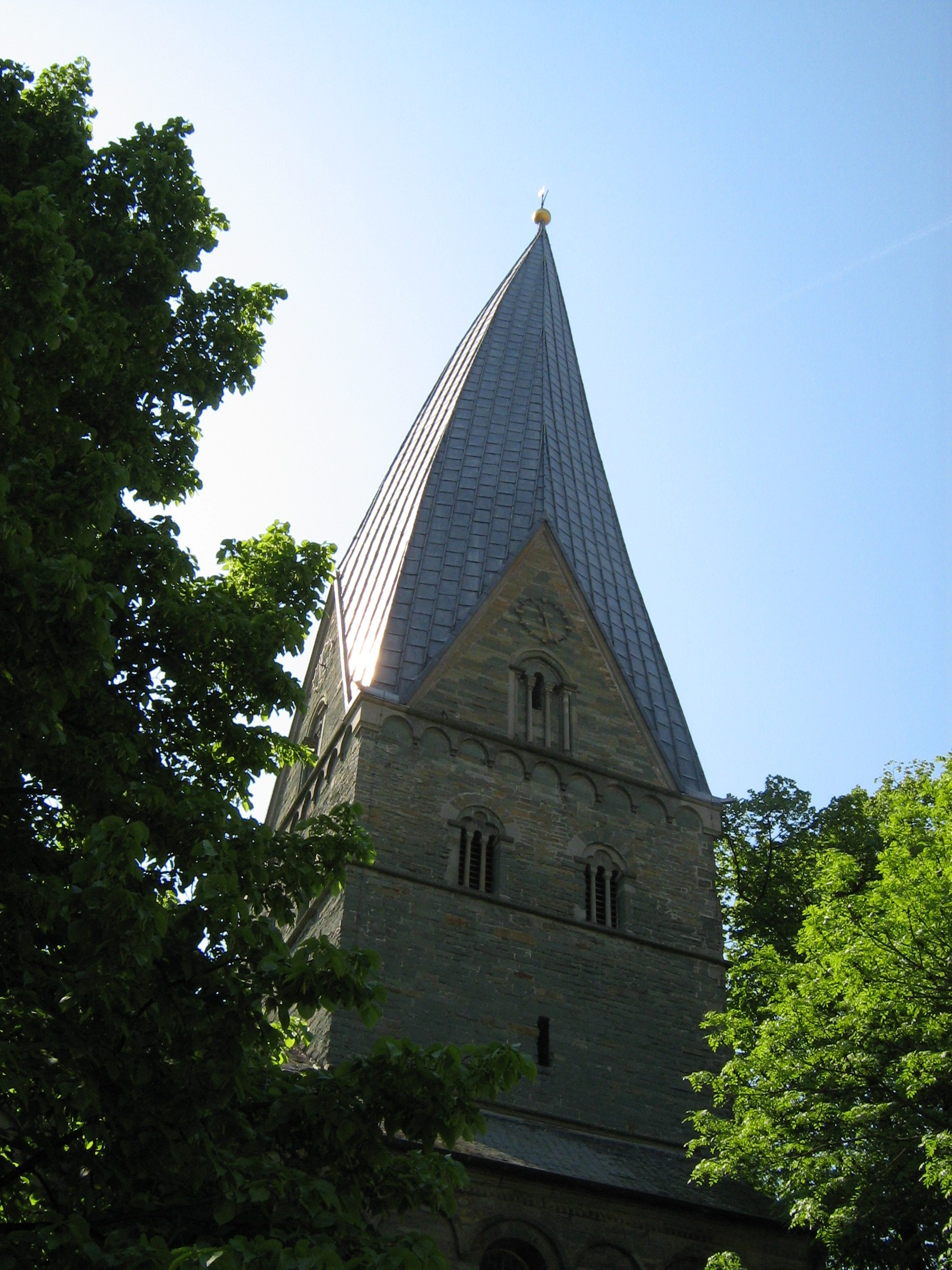 Turm von Alt-St.Thomä in Soest von Norden